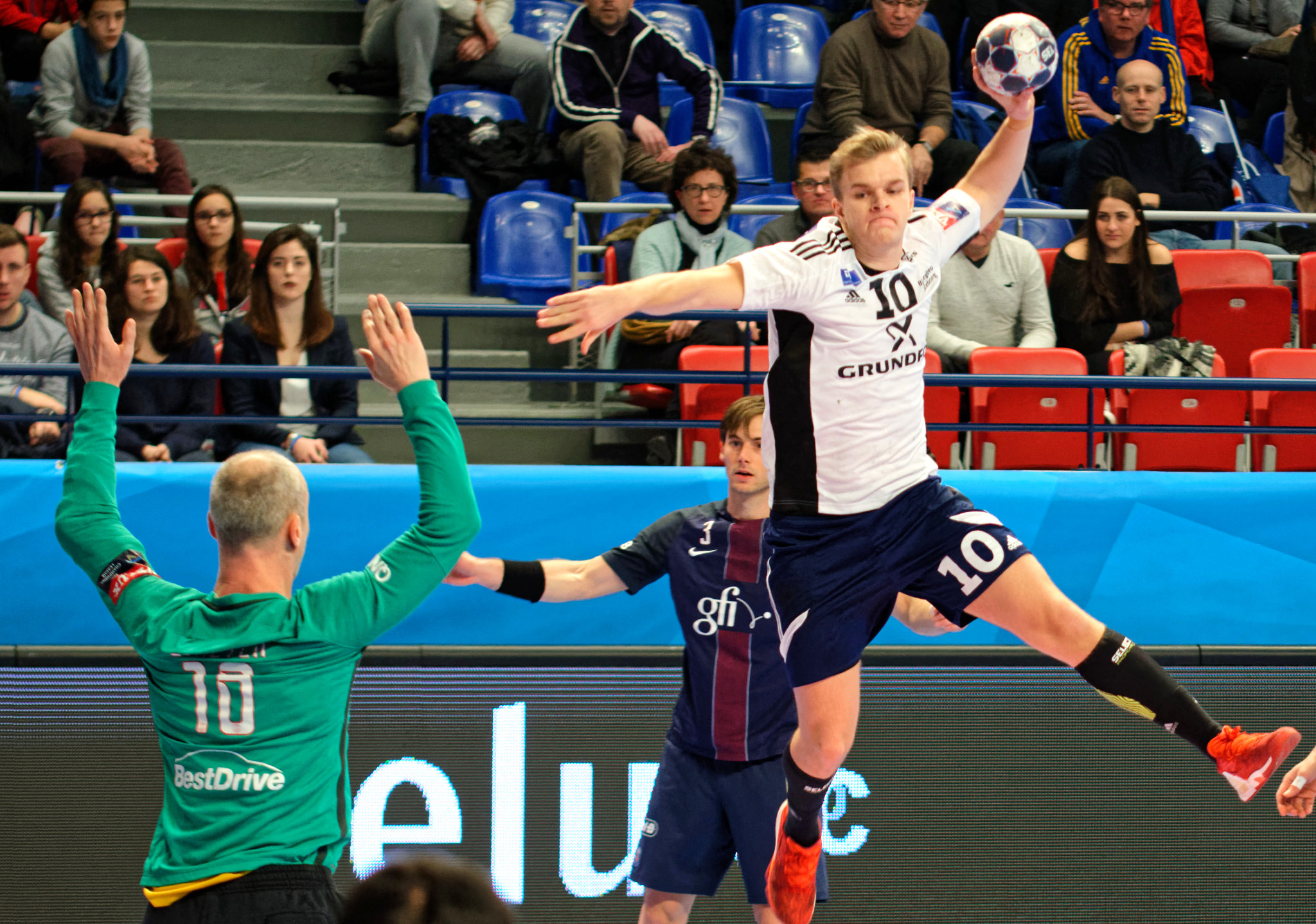 Rencontre de phase de groupe de la ligue des champions 2016-17 entre le PSG et Bjerringbro-Silkeborg. A Coubertin, le 11 février 2017.